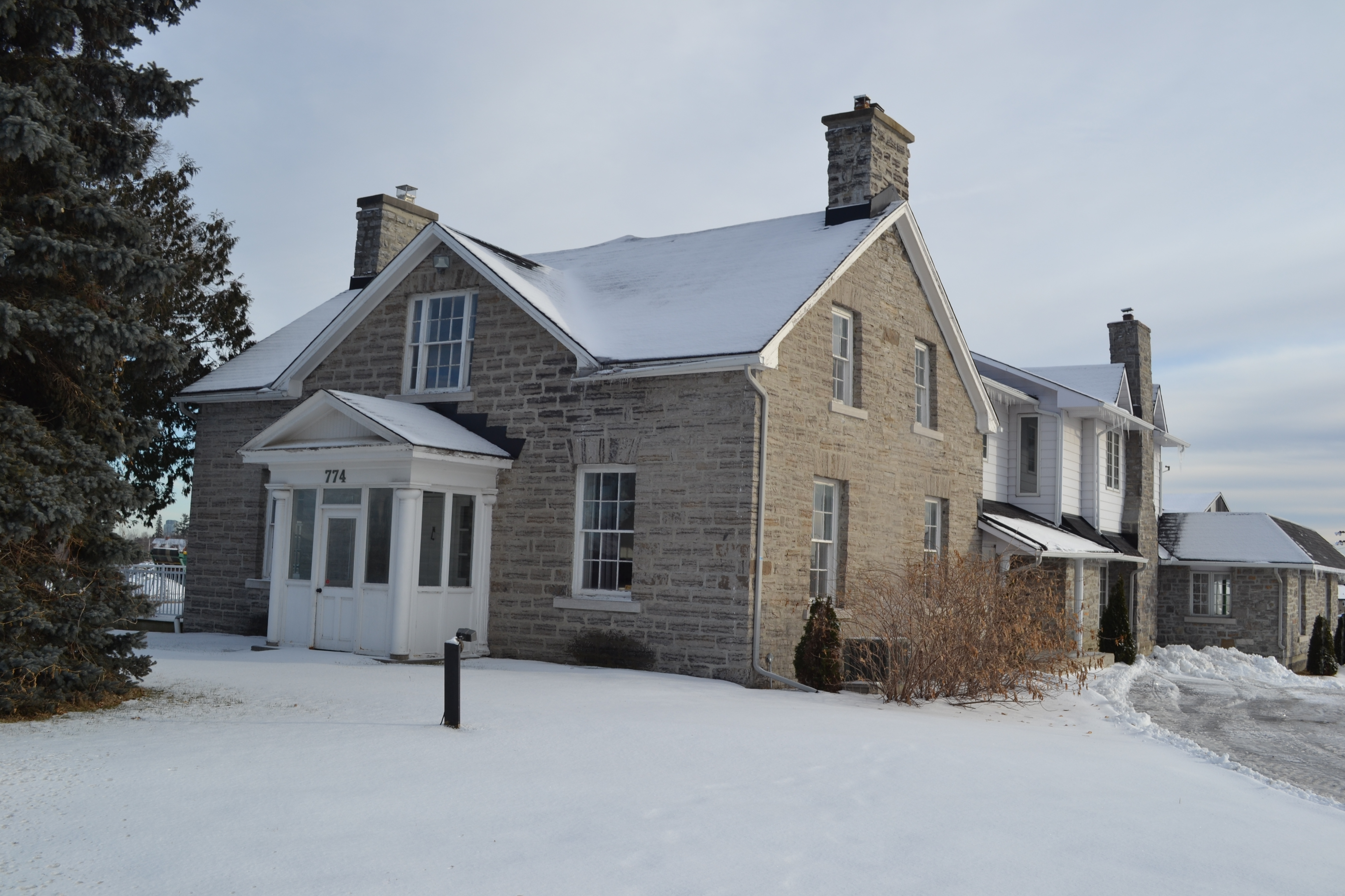 Maison Samuel-Stewart, sise au 774 chemin d'Aylmer à Gatineau, Quebec